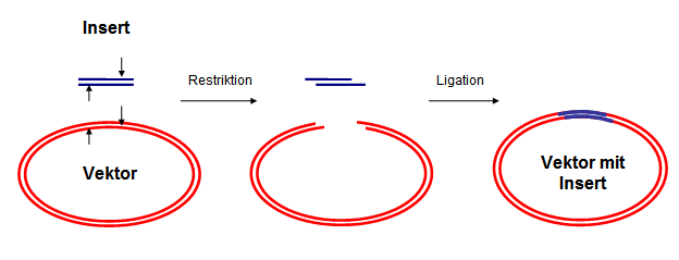 Klonierung eines PCR-Produkts in einen Vektor Ersteller: Andymuc